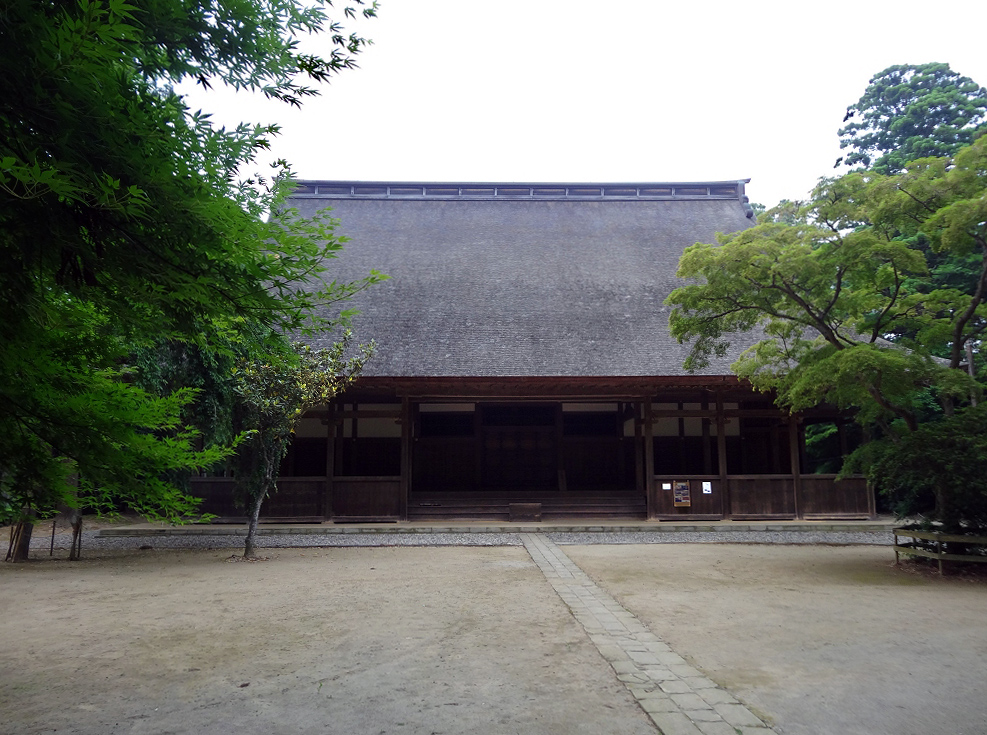 飯高壇林講堂